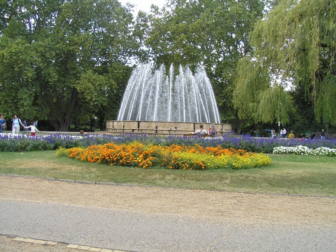 Szökőkút a budapesti Margit-szigeten